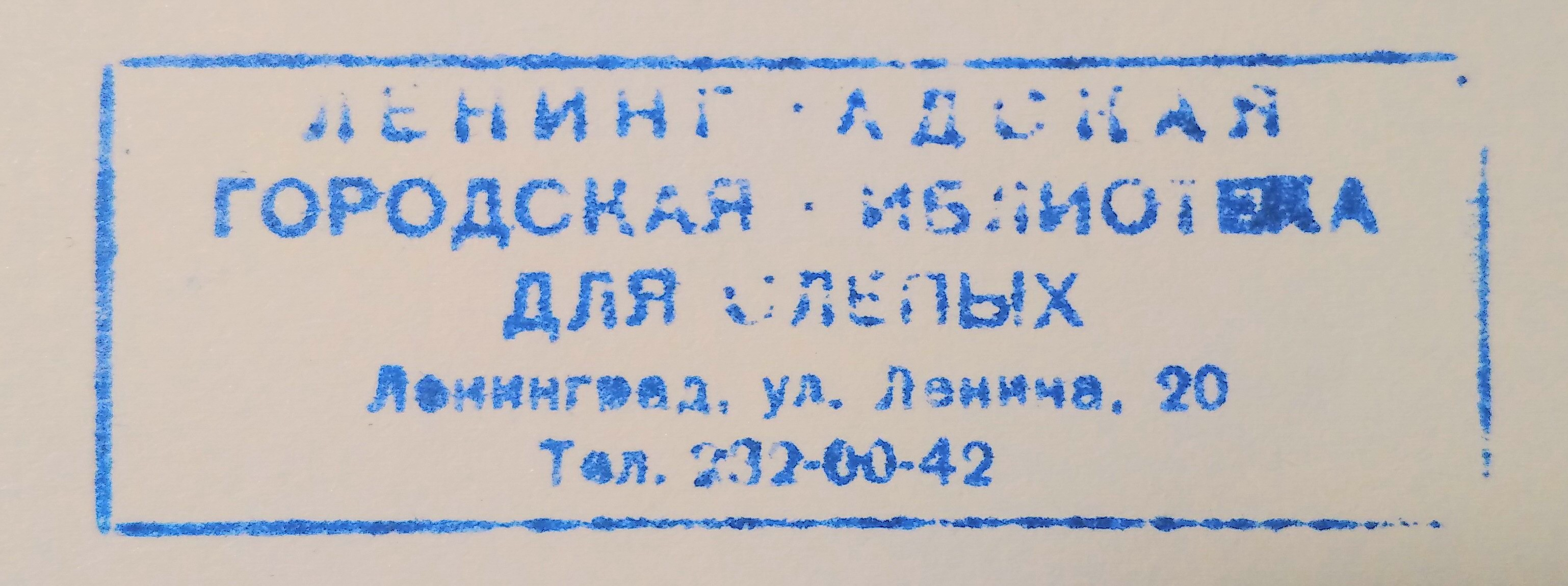 Печать ГБСС